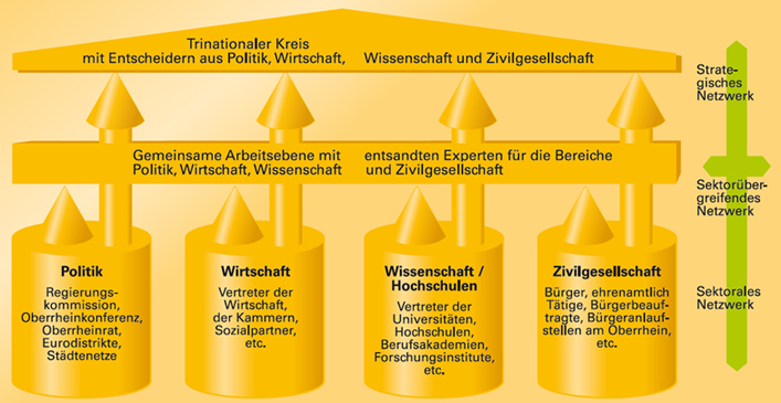 Aufbau: griechischer Tempel mit den vier Säulen der Trinationalen Metropolregion Oberrhein